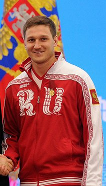 Медалью ордена «За заслуги перед Отечеством» первой степени награждён серебряный призёр Олимпийских игр в сноуборде Николай Олюнин.